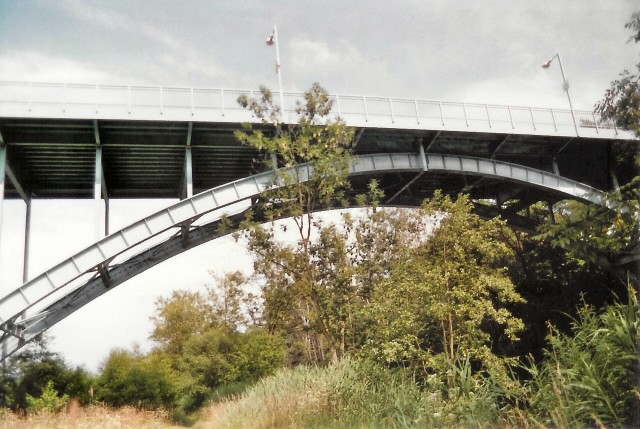 Tyršův most od Radbuzy vyfocený v červenci 2006.